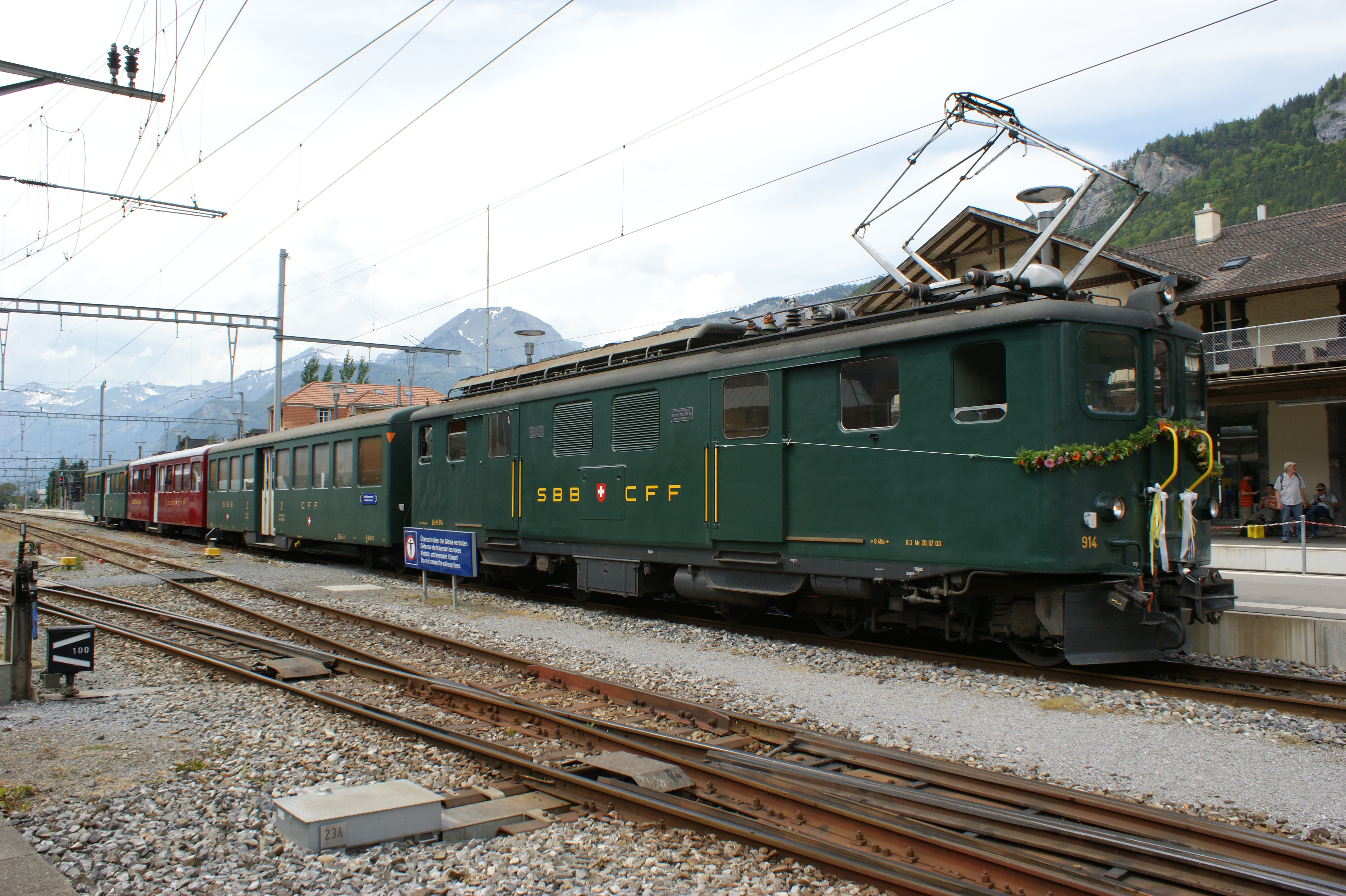 Brünigbahnzug aus der Elektrifikationszeit anlässlich des 125-jährigen Jubiläums der Strecke Alpnachstad–Brienz